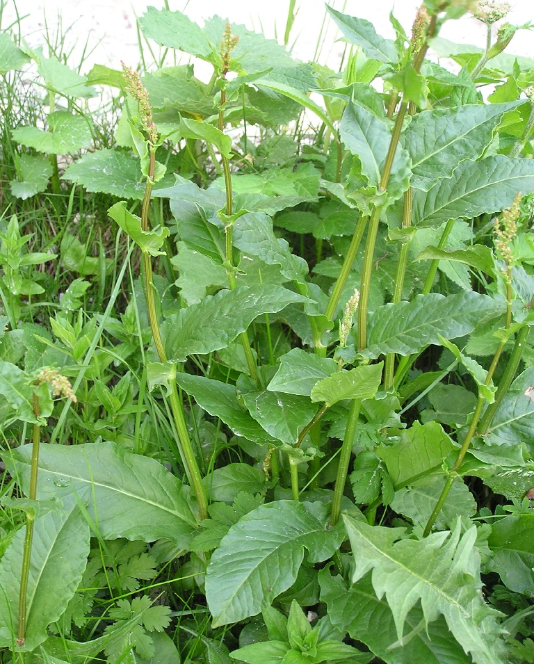 Rumex arifolius. An der Mittelstation der Krippensteinseilbahn (Obertraun, Salzburger Land, Österreich). Im Bergwald, ca. 1500m hoch.